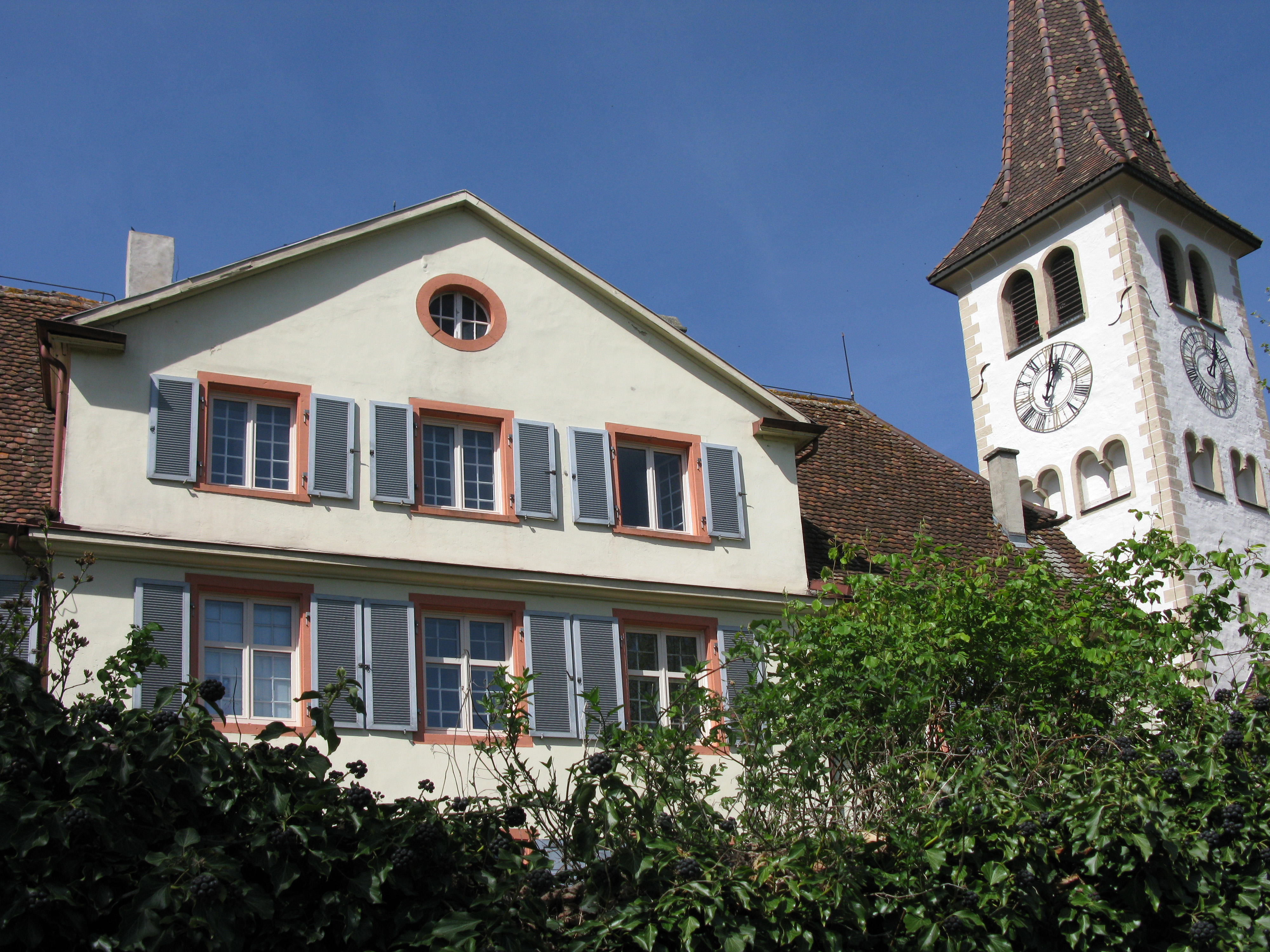 Schloss mit St. Leodegar in Bad Krozingen-Biengen